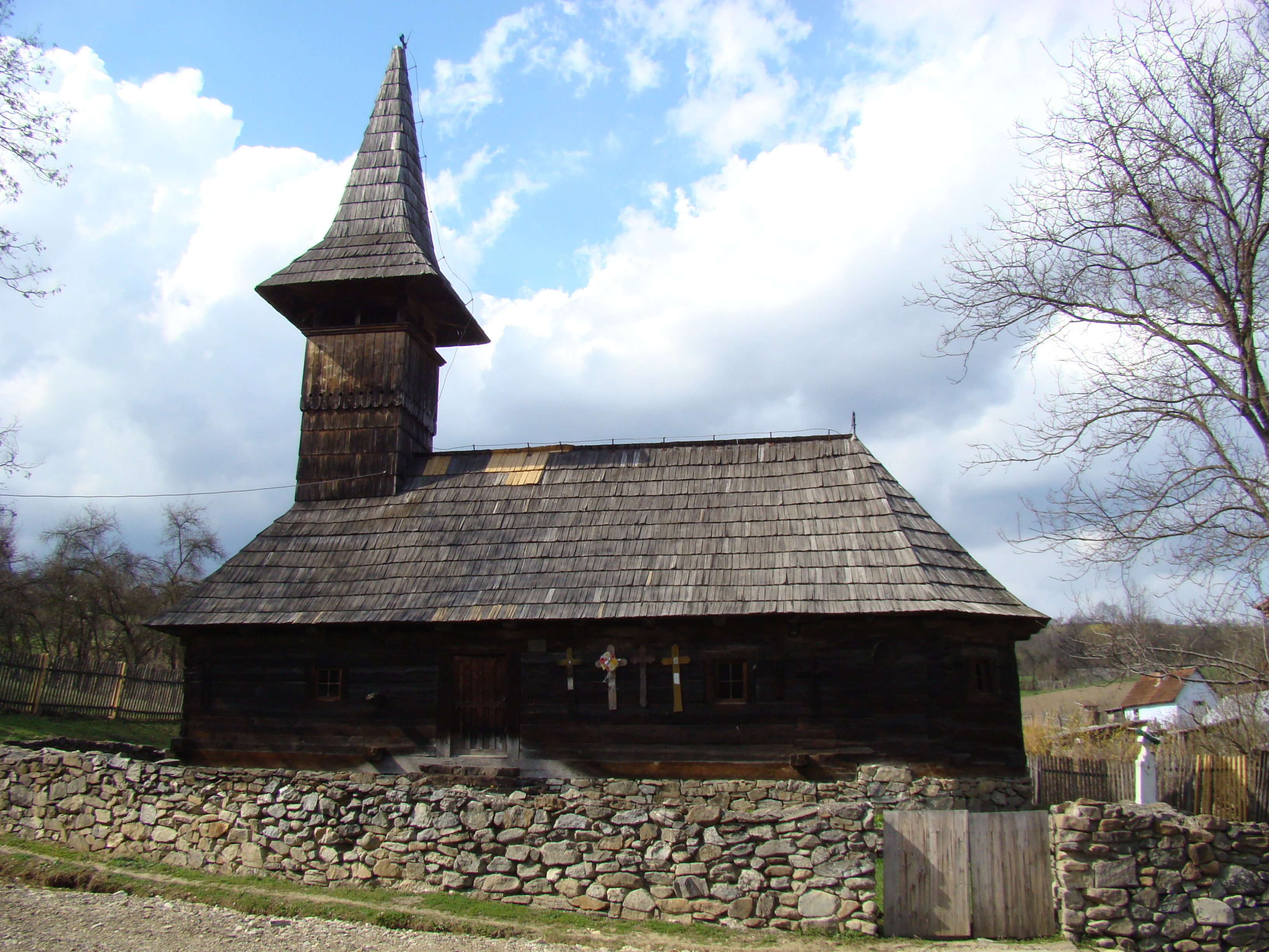 Biserica de lemn "Întâmpinarea Domnului", sat GROŞII NOI; comuna BÂRZAVA